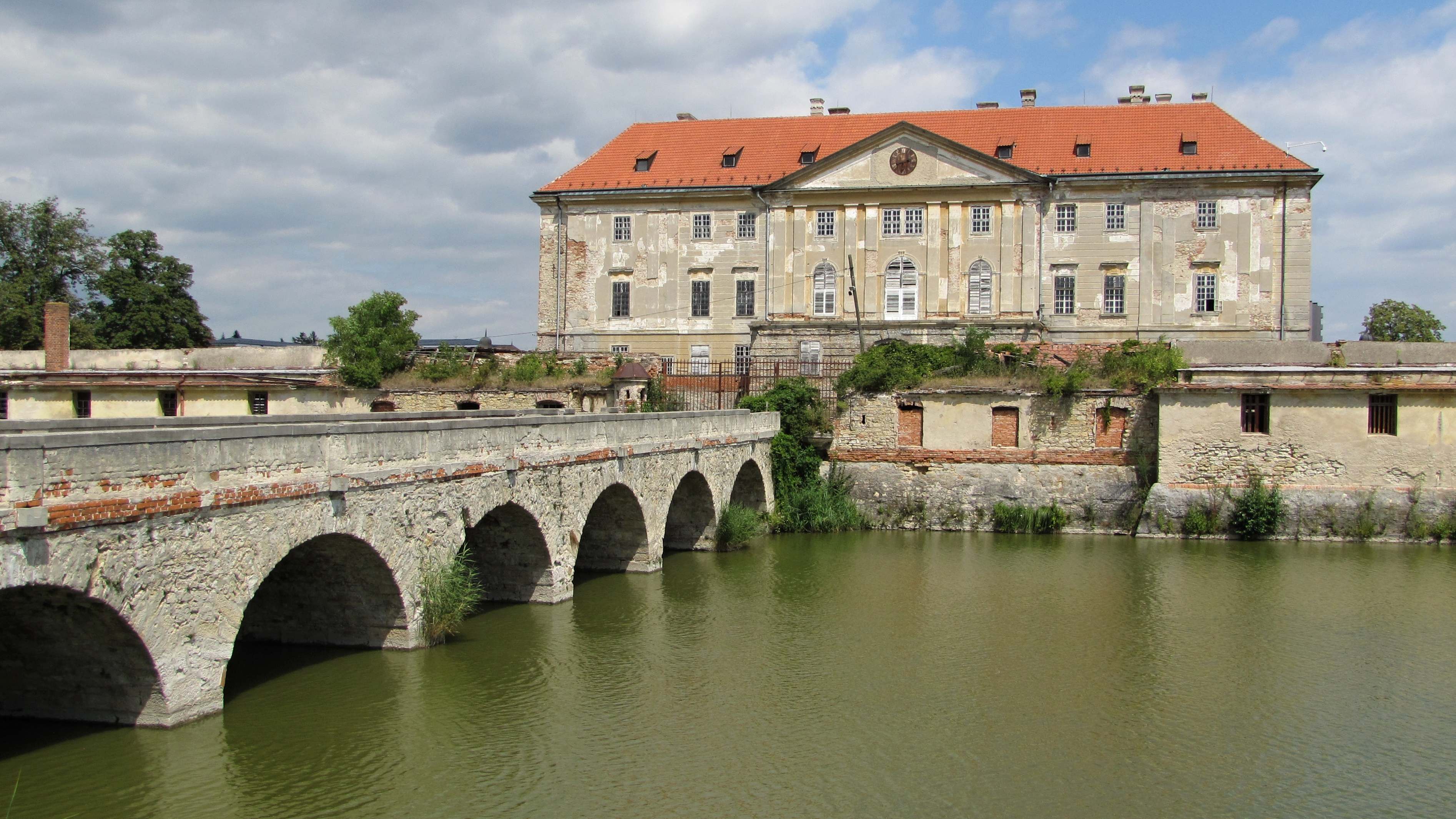 Holíčský zámek, jihozápadní křídlo